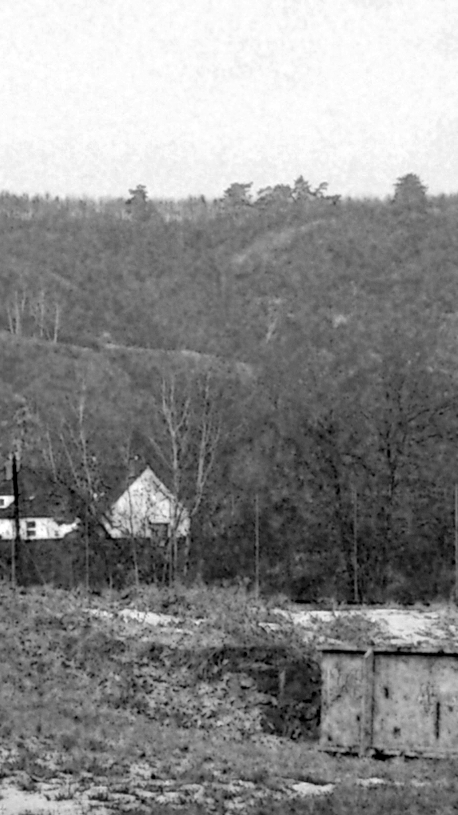 Prokopské údolí